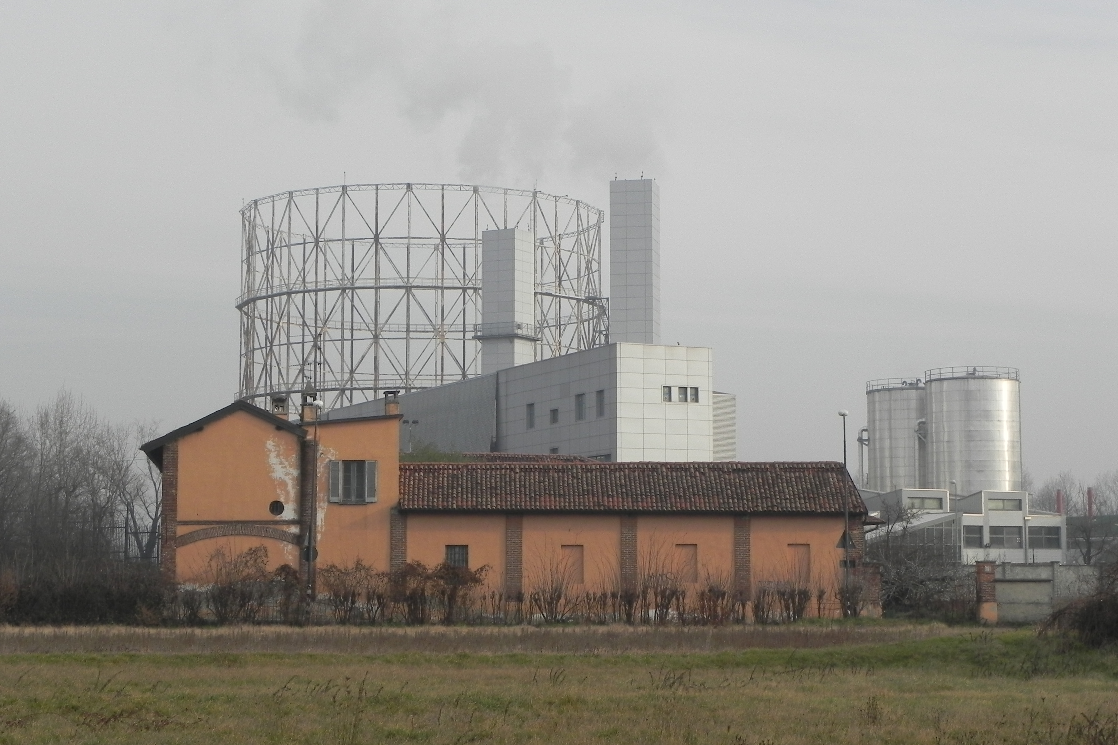 Milano, la Cascina Sant'Ambrogio, a Cavriano.